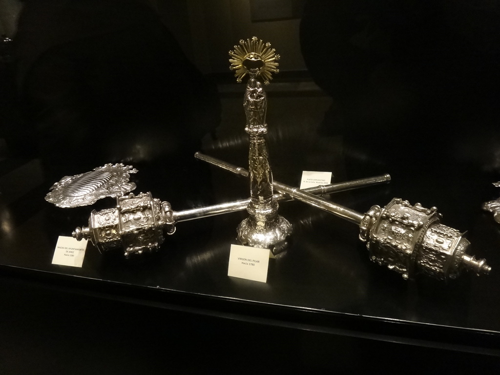 Mazas del Ayuntamiento de Jerez de la Frontera (Andalucía, España)